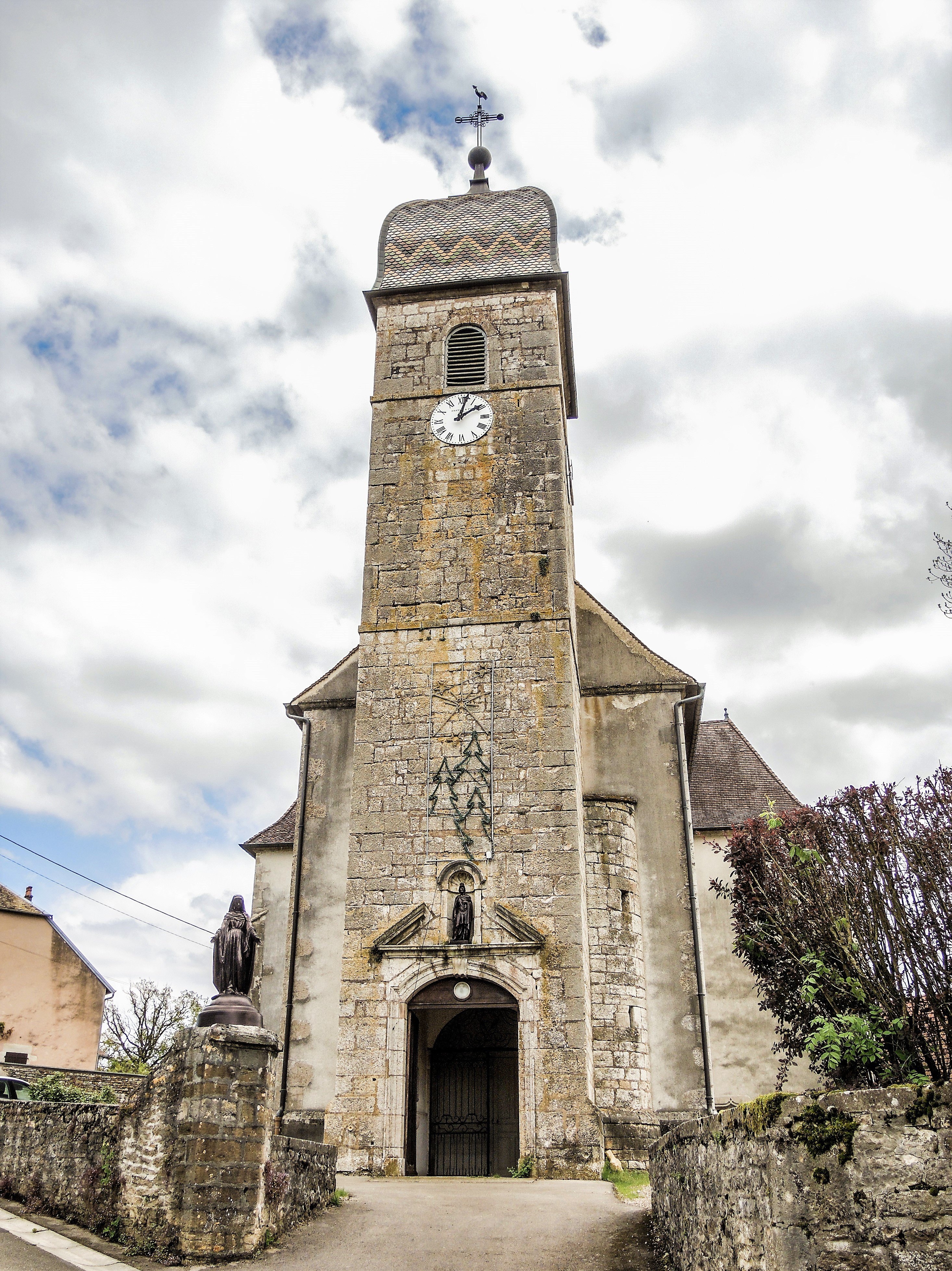 Porche et clocher de l'église